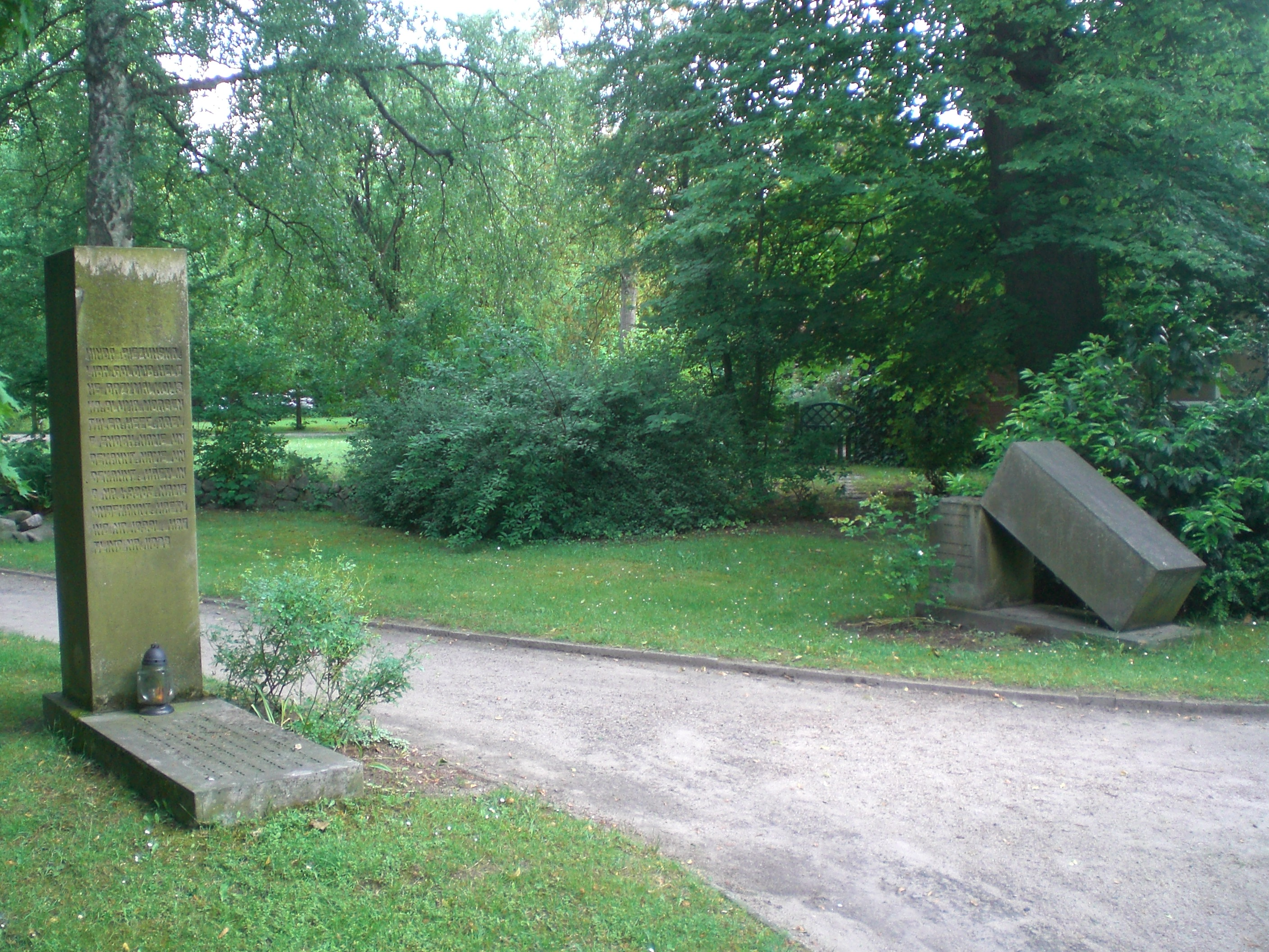 Denkmal im Kirchhof der Bergstedter Kirche für die Opfer des Außenlagers Sasel des Konzentrationslagers Neuengamme, die seinerzeit auf dem Bergstedter Friedhof beerdigt wurden. Geschaffen von dem Mecklenburger Bildhauer Axel Peters und im November 1990 errichtet.